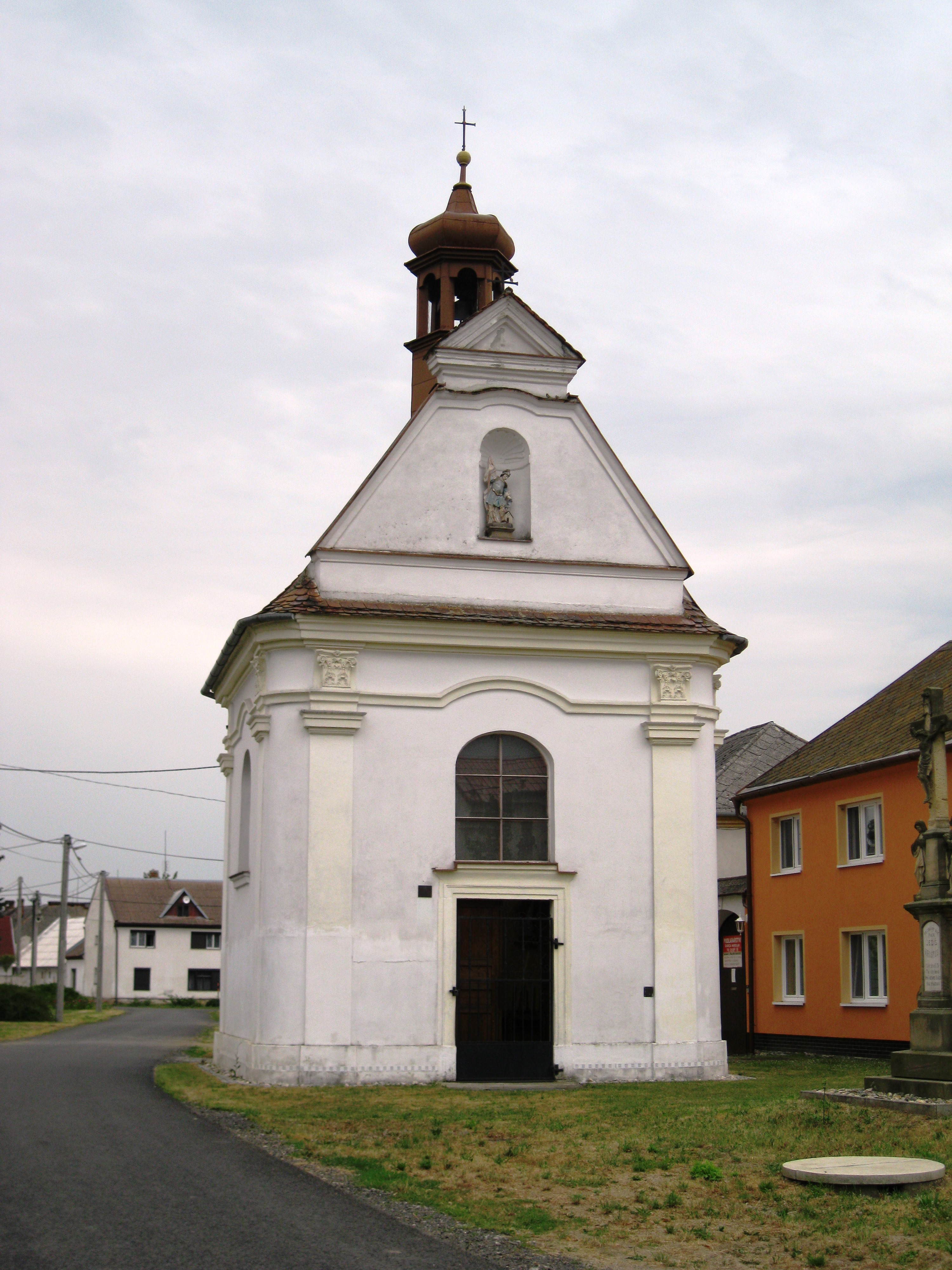 Kaple sv. Floriána (Tři Dvory), Tři Dvory